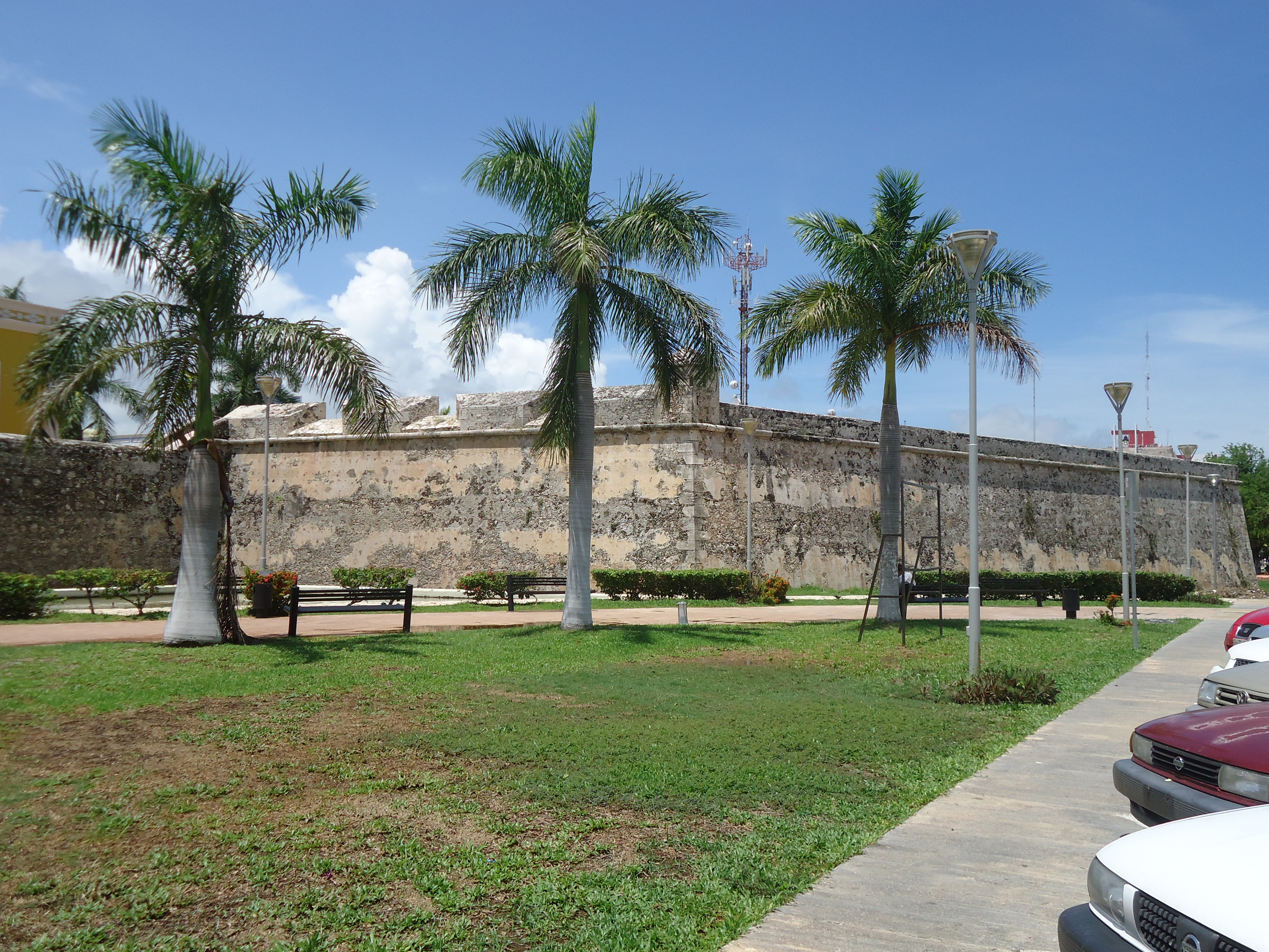 Imagen del baluarte de la Soledad